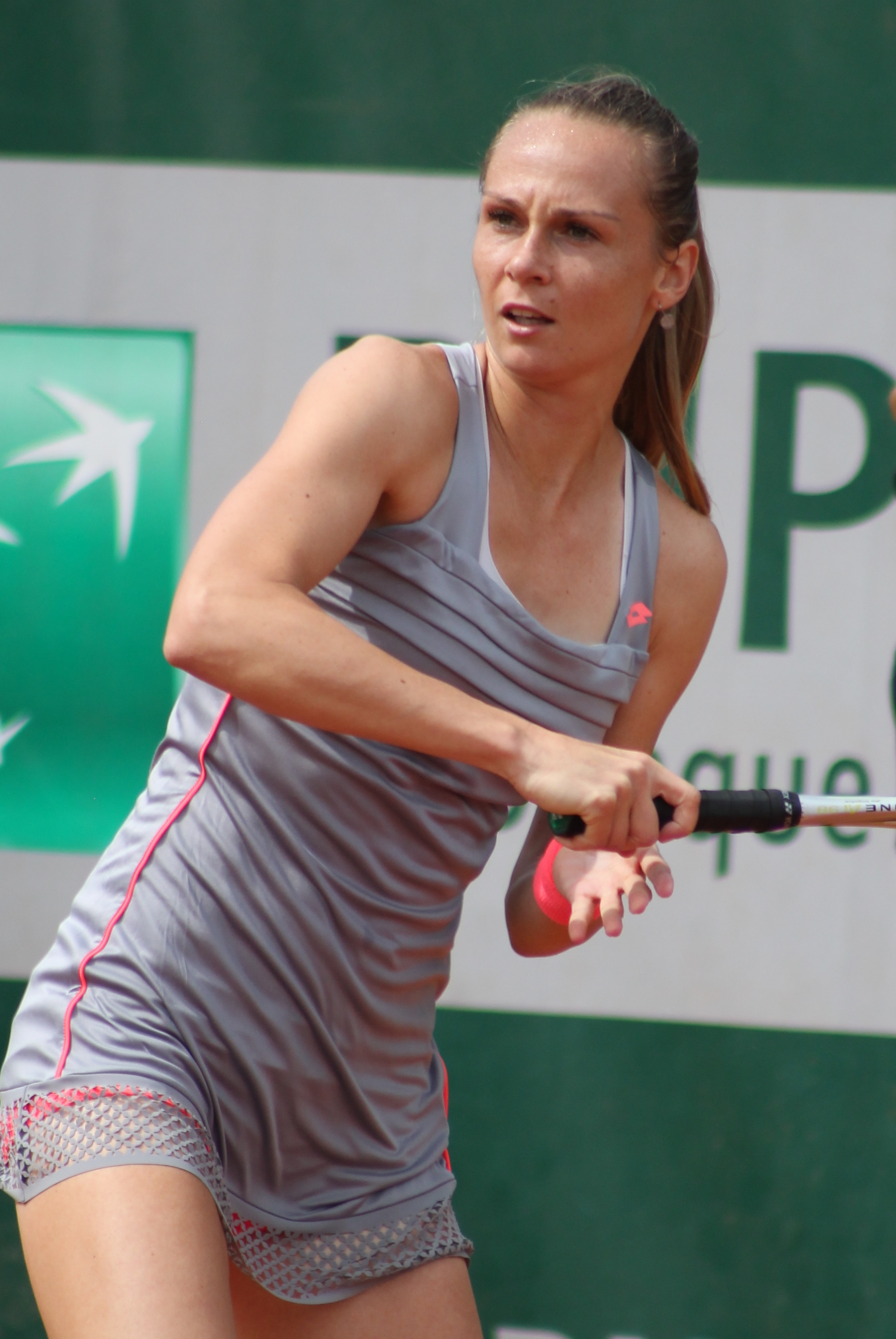 Rybarikova RG15 (1)